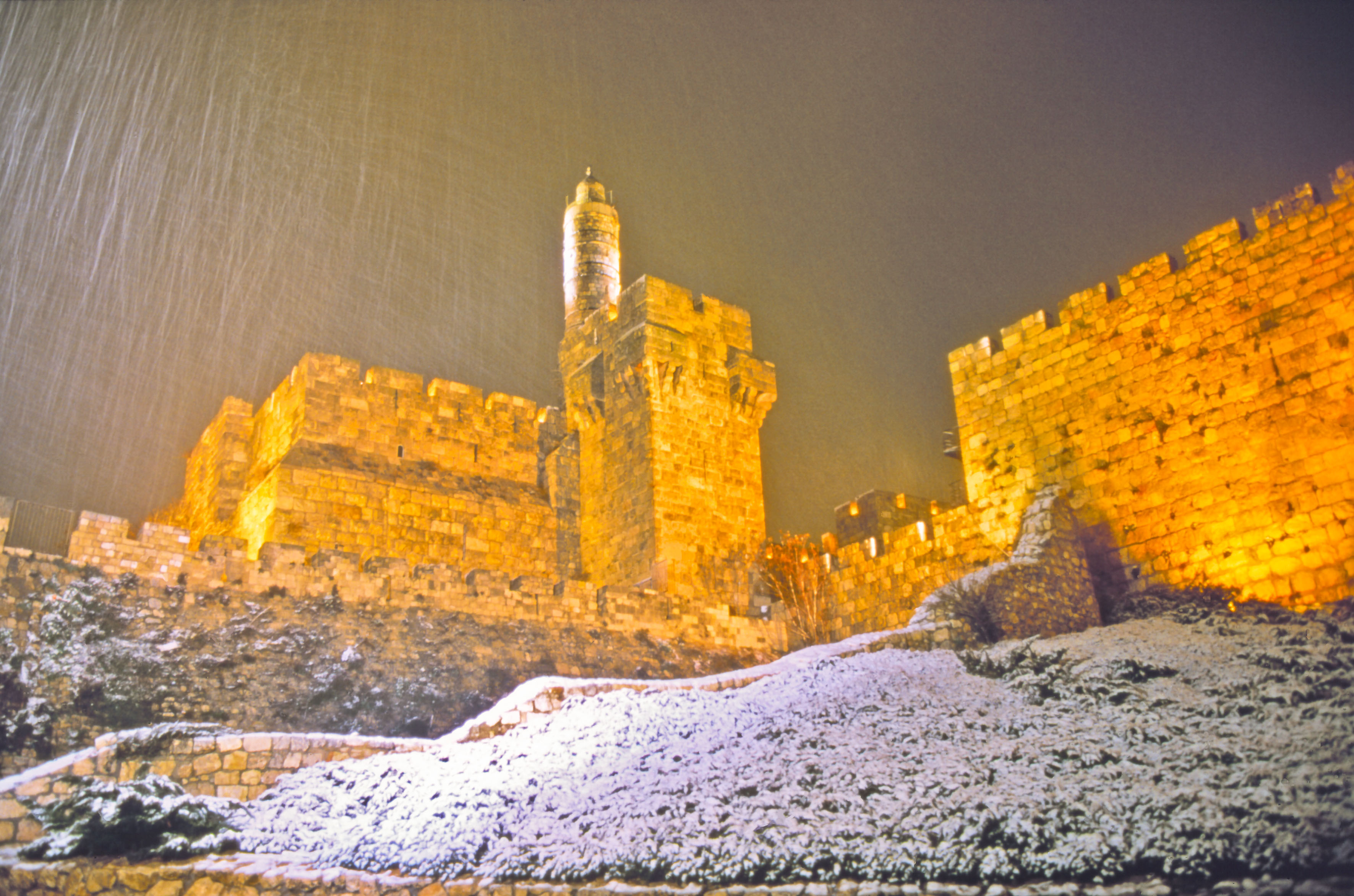 הכינוי שניתן למצודה שהגנה במהלך הדורות על העיר ירושלים